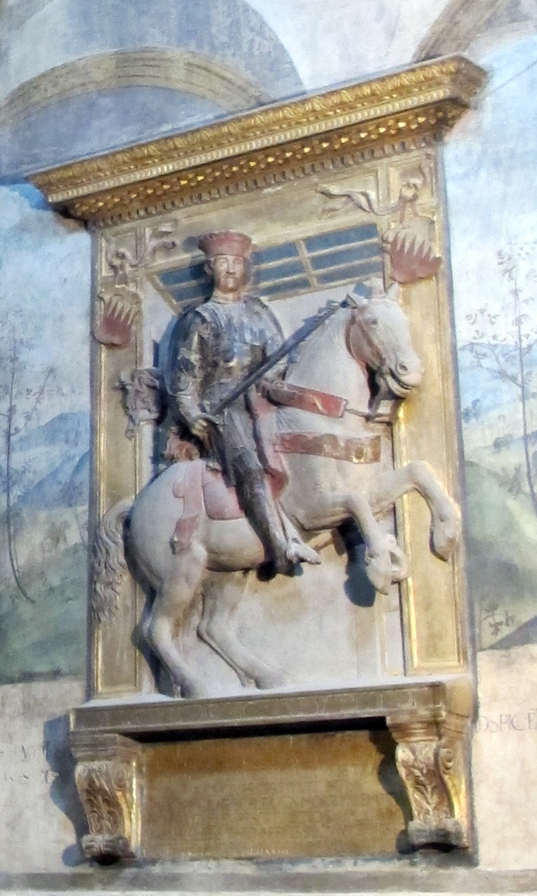 Monumento equestre di Annibale I Bentivoglio, cappella Bentivoglio, San Giacomo Maggiore (Bologna)